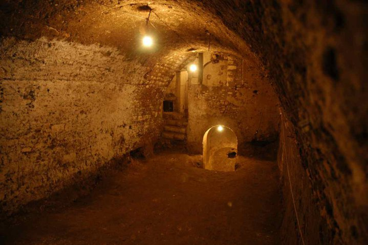 ipogei Federico II Foggia